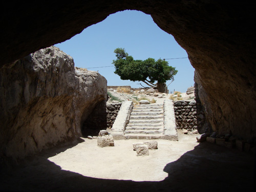 نیایشگاه مهری/ امامزاده معصوم ورجودی